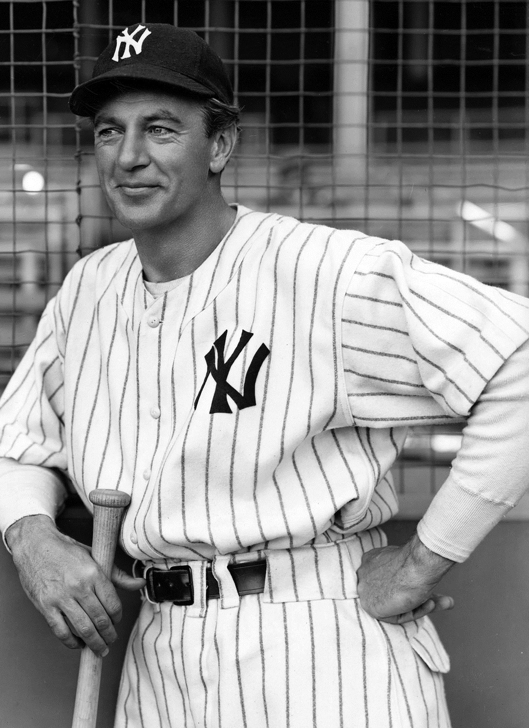 映画「打撃王」のゲイリー・クーパーの広報用写真